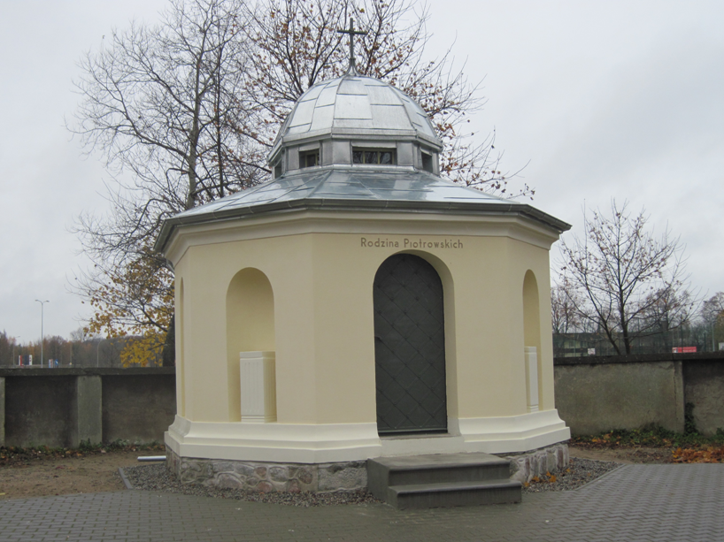 Grobowiec Rodziny Piotrowskich na gnieźnieńskim cmenatrzu